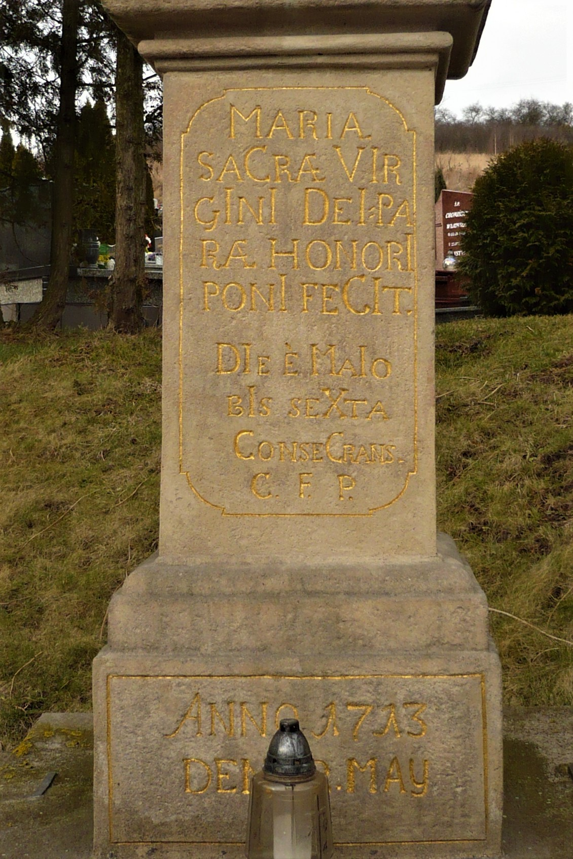 Kolumna Maryjna na cmentarzu w Nowej Rudzie (postument)